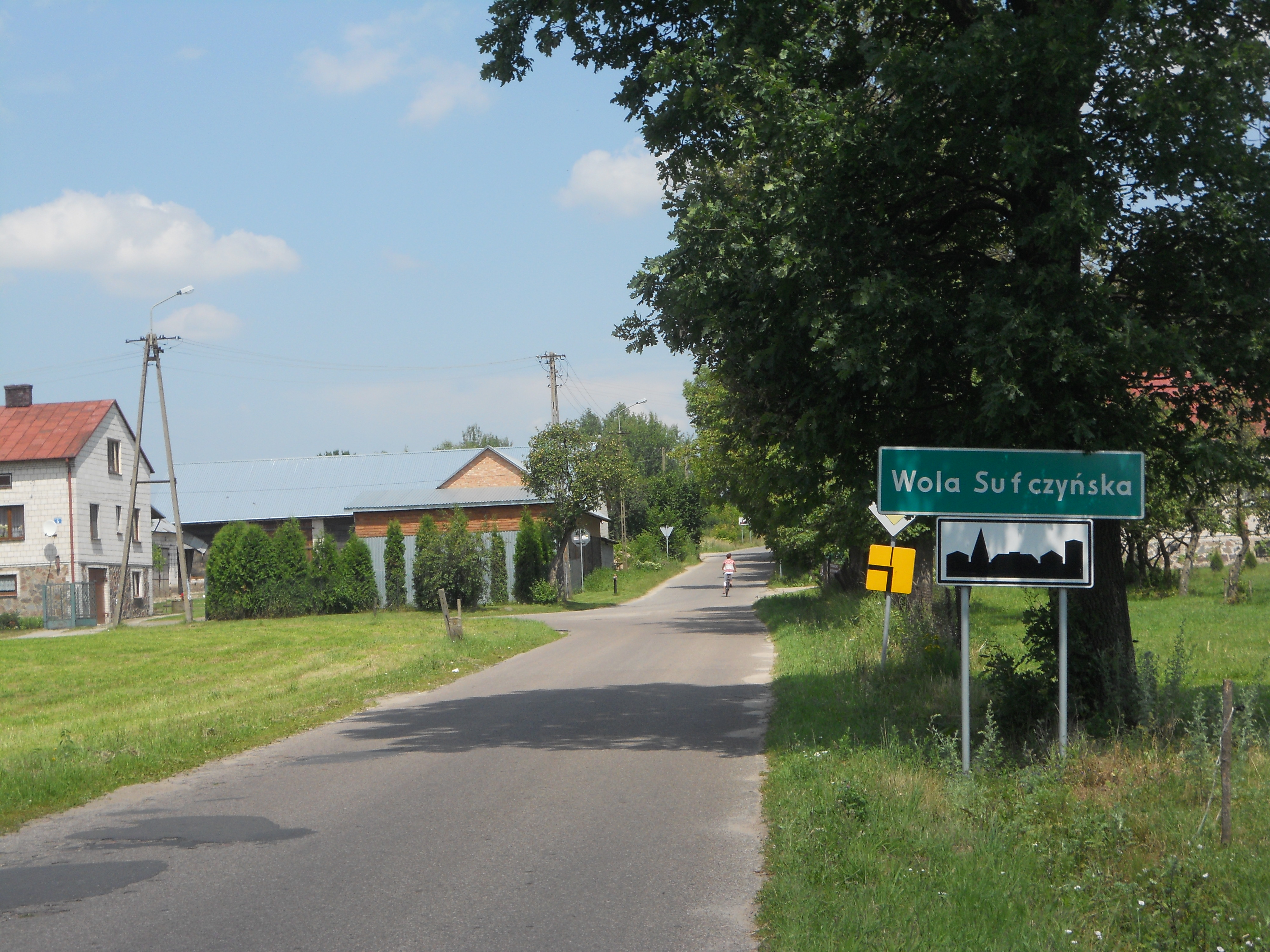 Wjazd do Woli Sufczyńskiej od strony Sufczyna